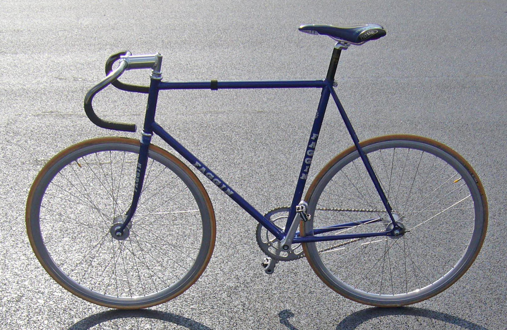 Bahnrad des Herstellers Faggin